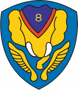 Gambar ini adalah Lambang Skuadron Udara 8, Koops AU I